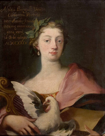 Ritratto della letterata veneziana Luisa Bergalli (1703-1779)